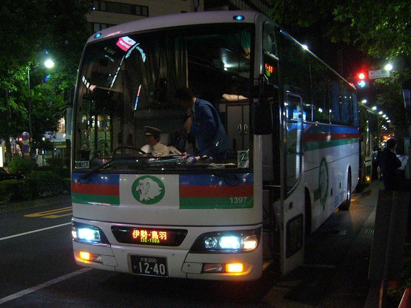 登録番号 大宮200か12-40 西武バス大宮営業所所属 車番1397 夜行用車両 （各系統で共通運用） 2006年10月8日 池袋駅東口にて撮影